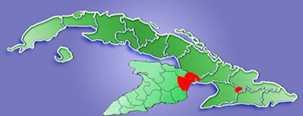 Municipio de la provincia Granma, en Cuba